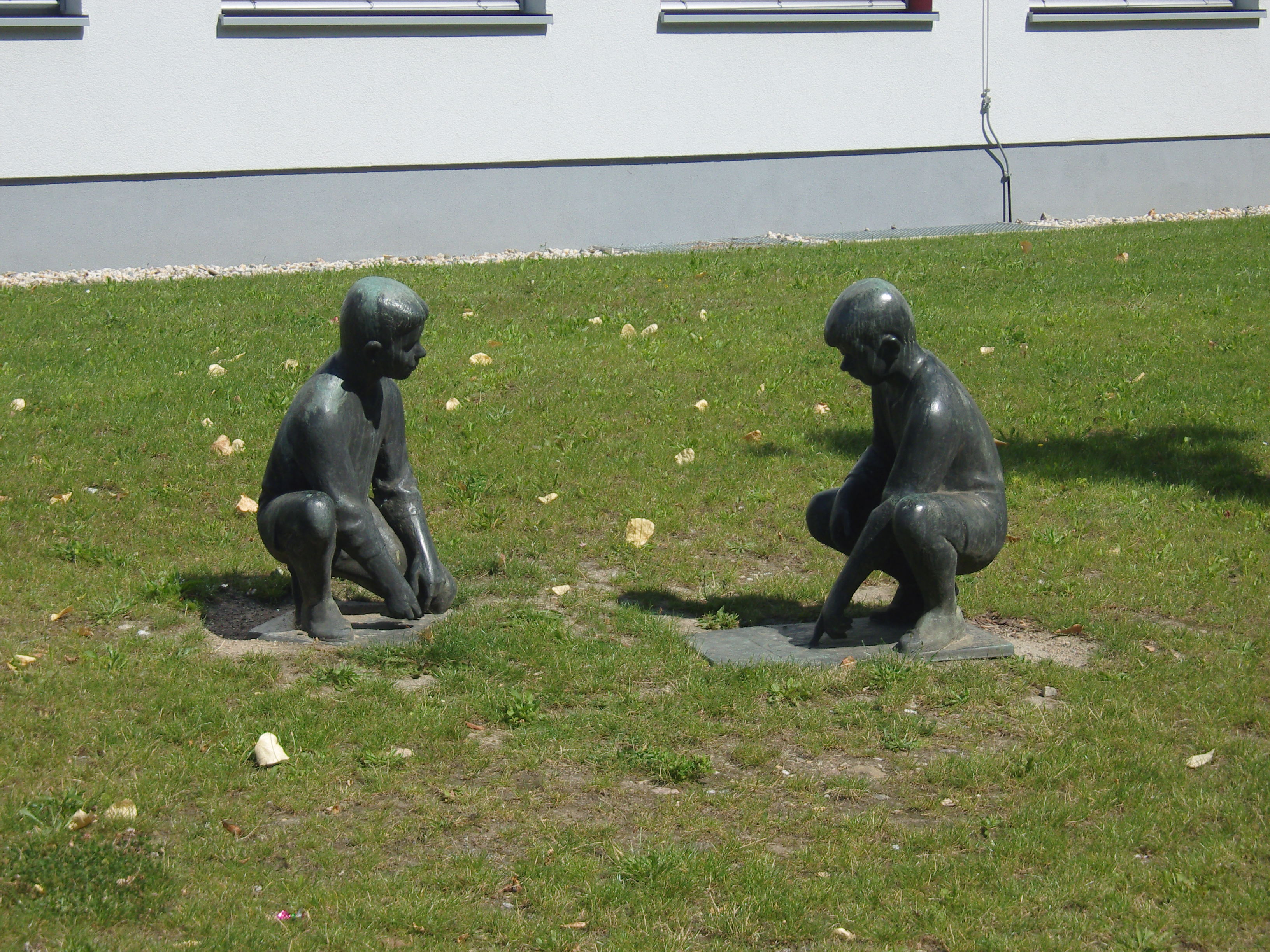 Bronzeplastikgruppe „Zeichnende Kinder“ von Hans Klakow aus dem Jahr 1961 vor dem Gebäude der Annenschule in Dresden, dargestellt sind Jungen, ursprünglich gehörte zur Gruppe ein Mädchen.